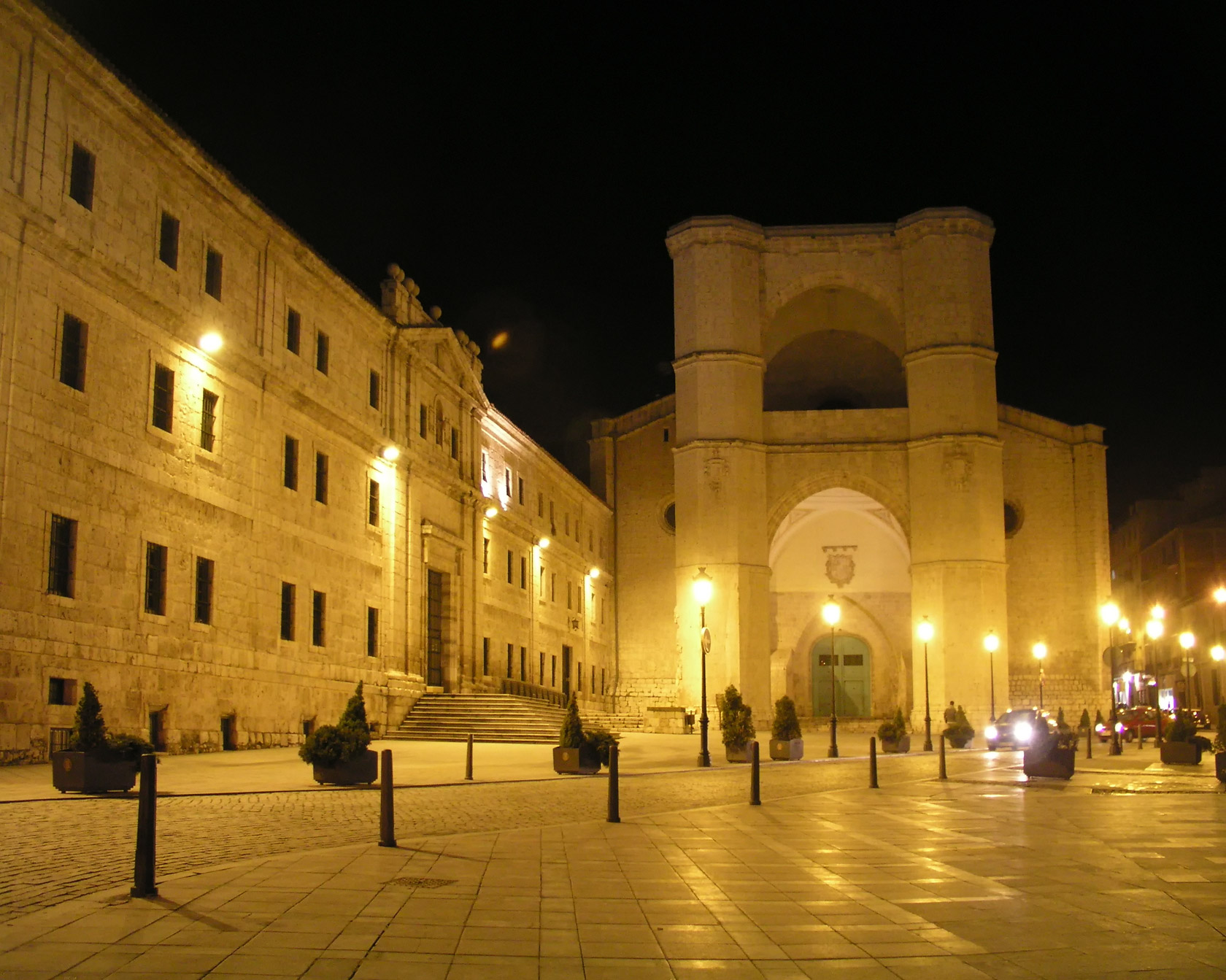 Convento de San Benito (Valladolid), de noche